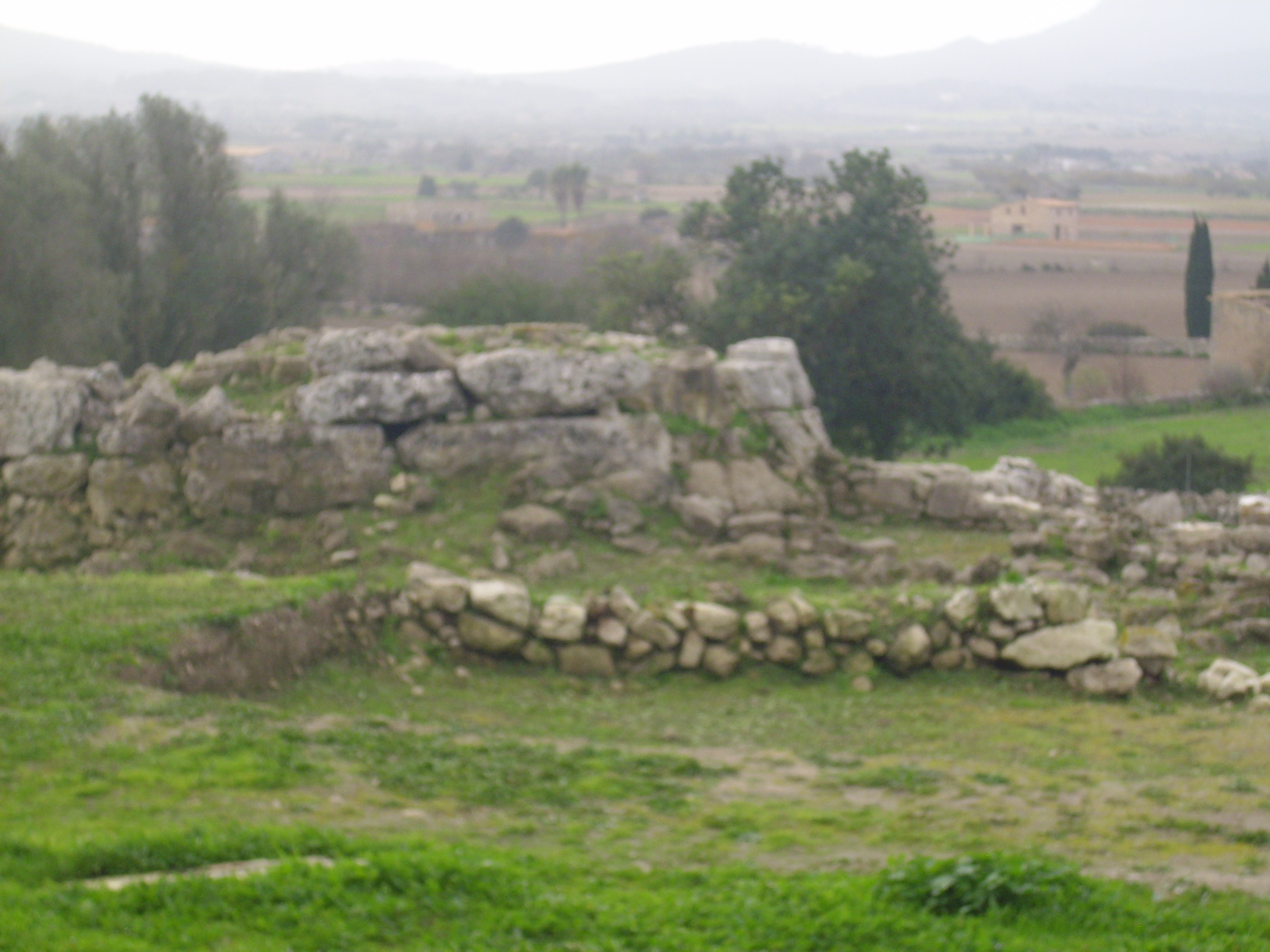 Yacimiento de Son Fornés (Mallorca)